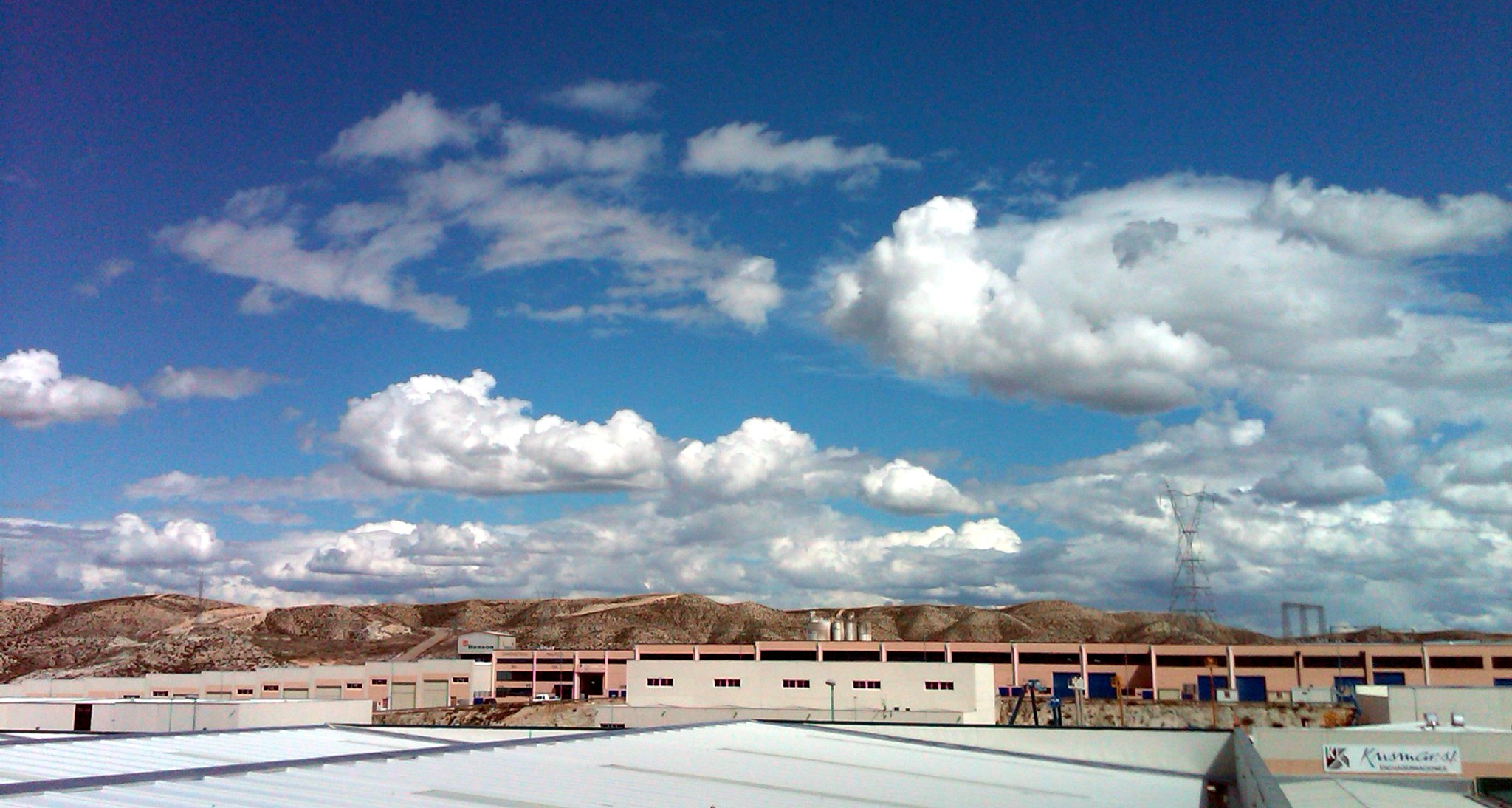 Cielo con nubes en Cuarte de Huerva